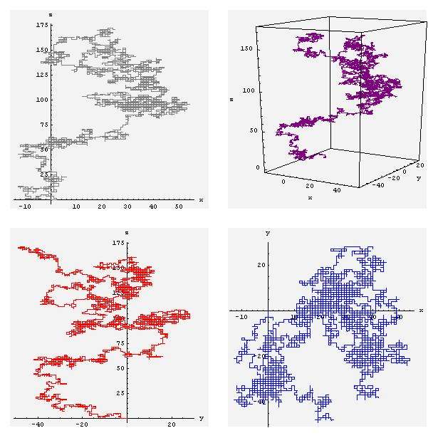 Trajectoire tridimensionnelle d'une marche aléatoire sur un réseau cubique et ses trois projections orthogonales planes.